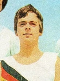 Klaus-Dieter Neubert, MUNCHEN/MONACO '72-PANINI-Figurina n.155- 2 CON-DDR-CANOTTAGGIO